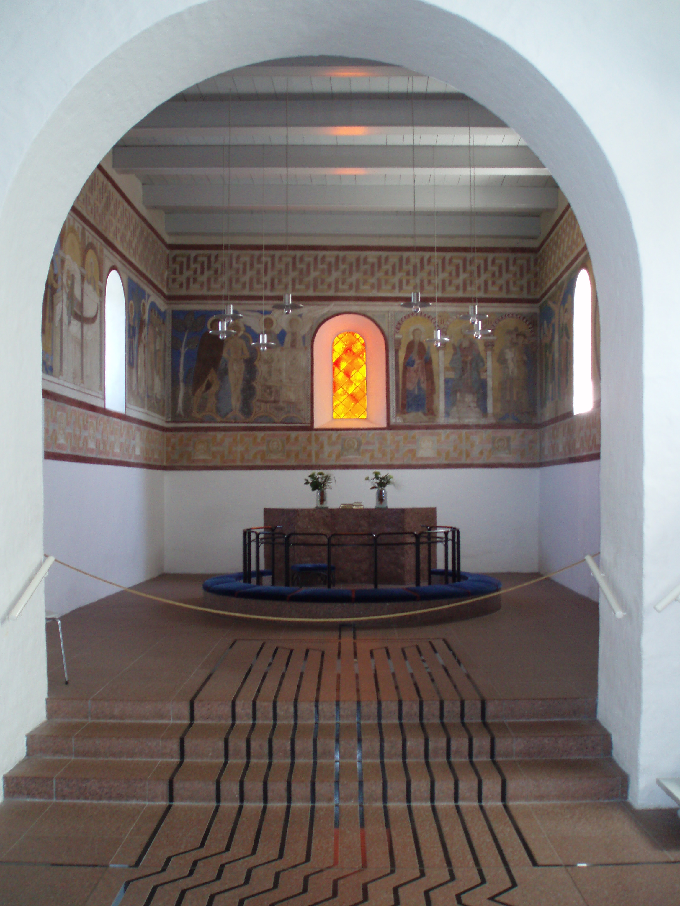 Jelling Kirke in Jelling, Denmark. Photographer: User:Brams